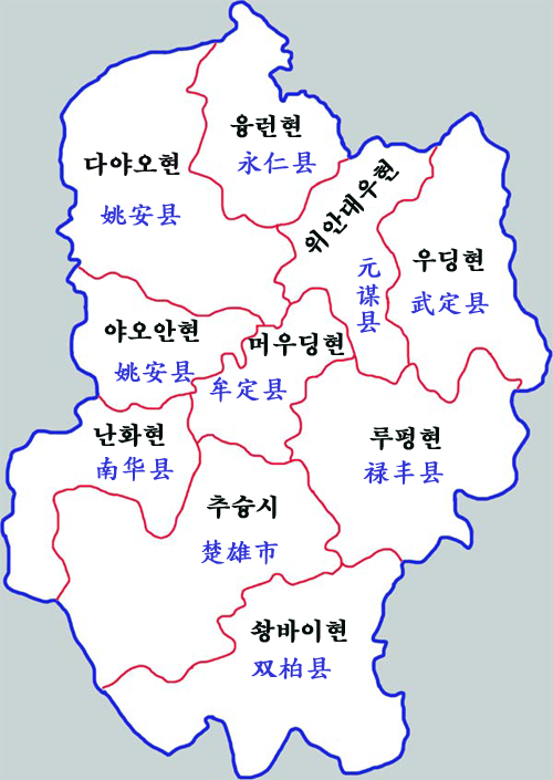 추슝이족자치주 현급구역